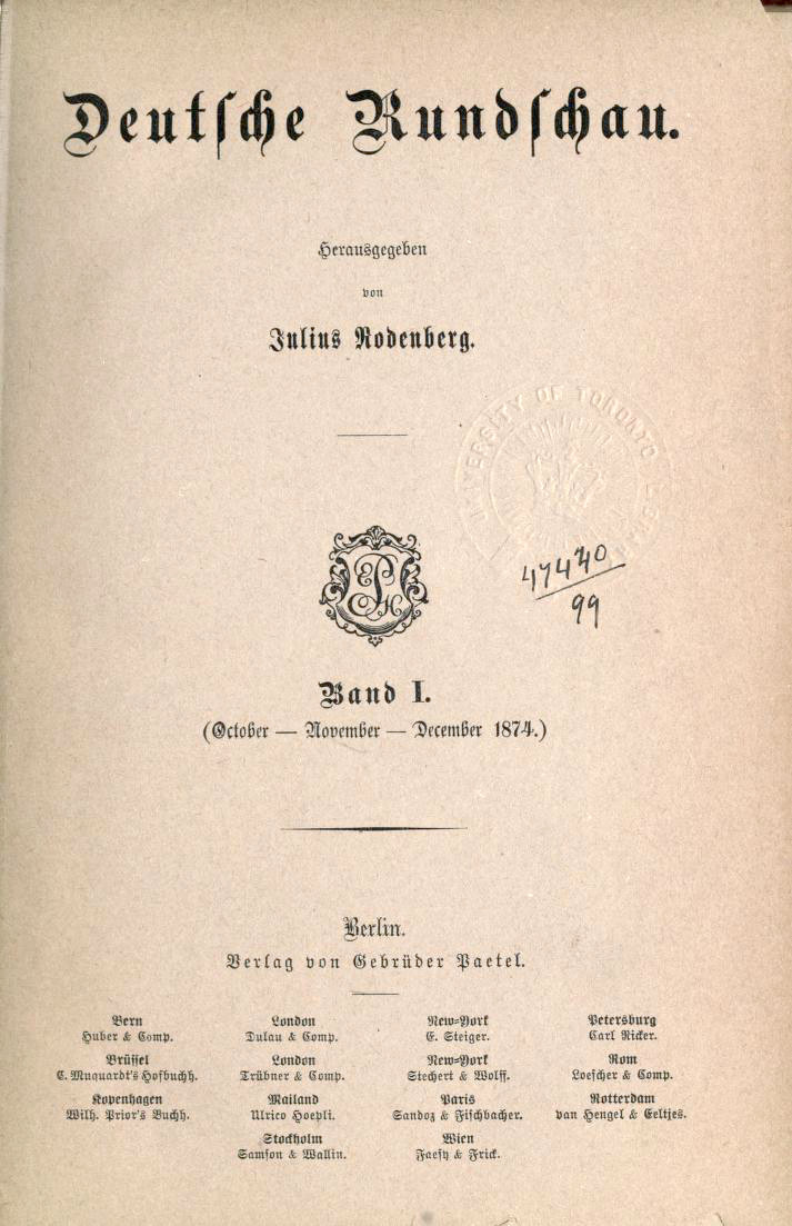 Deutsche Rundschau - Titelblatt der Erstausgabe (1874)